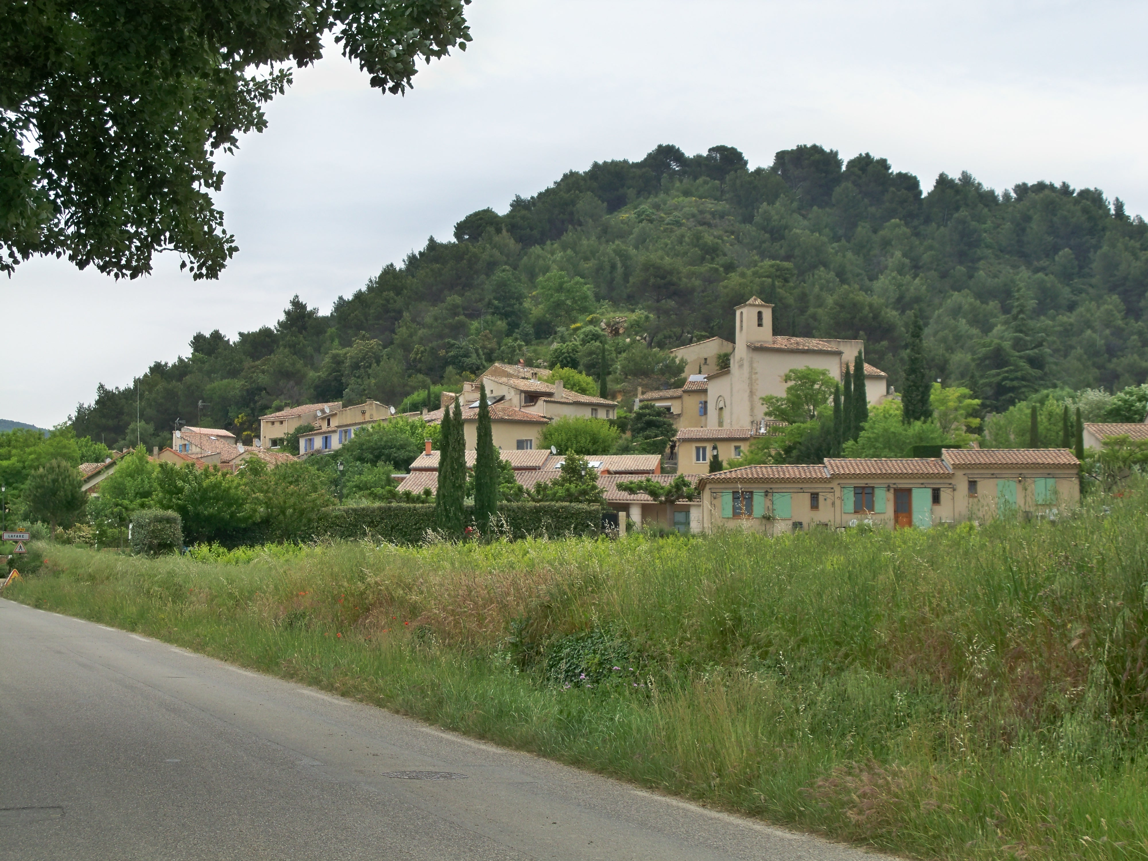 vue sur Lafare